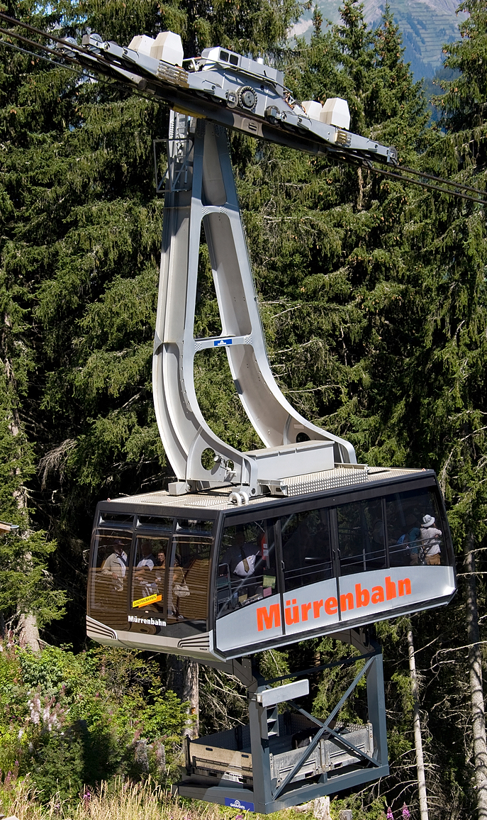 Luftseilbahn der Mürrenbahn: Lauterbrunnen - Grütschalp